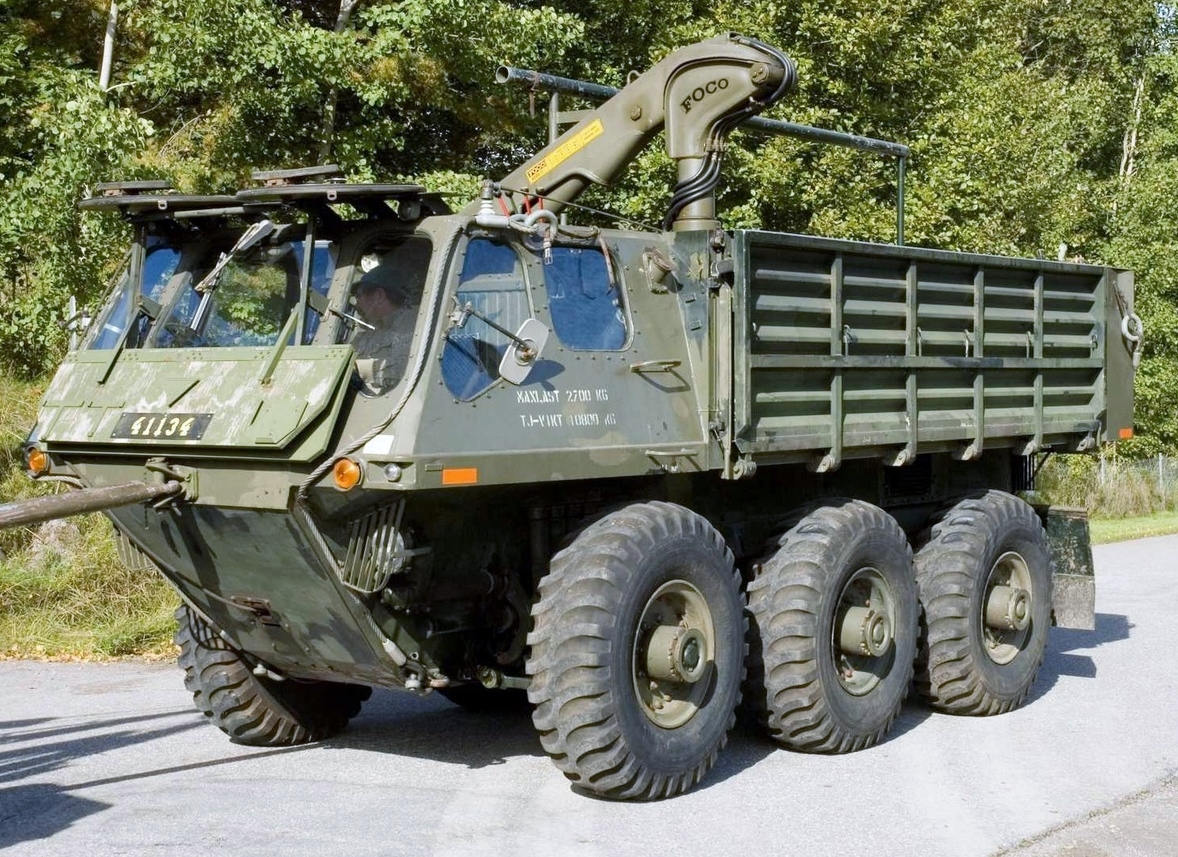 Amfibiebil 101 (M5198-101032) eller Alvis Stalwart köptes in till Sverige år 1962 som försöksfordon, som underhållsfordon till kustjägarebataljonerna. År 1969 övergick fordonet till rörlig spärrbataljon där den drog mätstation Arte 719. År 1985 utgick fordonet ur krigsorganisationen. Just detta fordon är tillverkat 1967 och är en Amfibiebil 101C med milregnr: 41134, och har tjänstgjort vid Blekinge kustartilleriförsvar (KA 2) Fordonet fanns även i versionen Amfibiebil 101B.